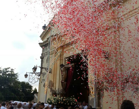 Processione del Santissimo Crocifisso a Palmi.